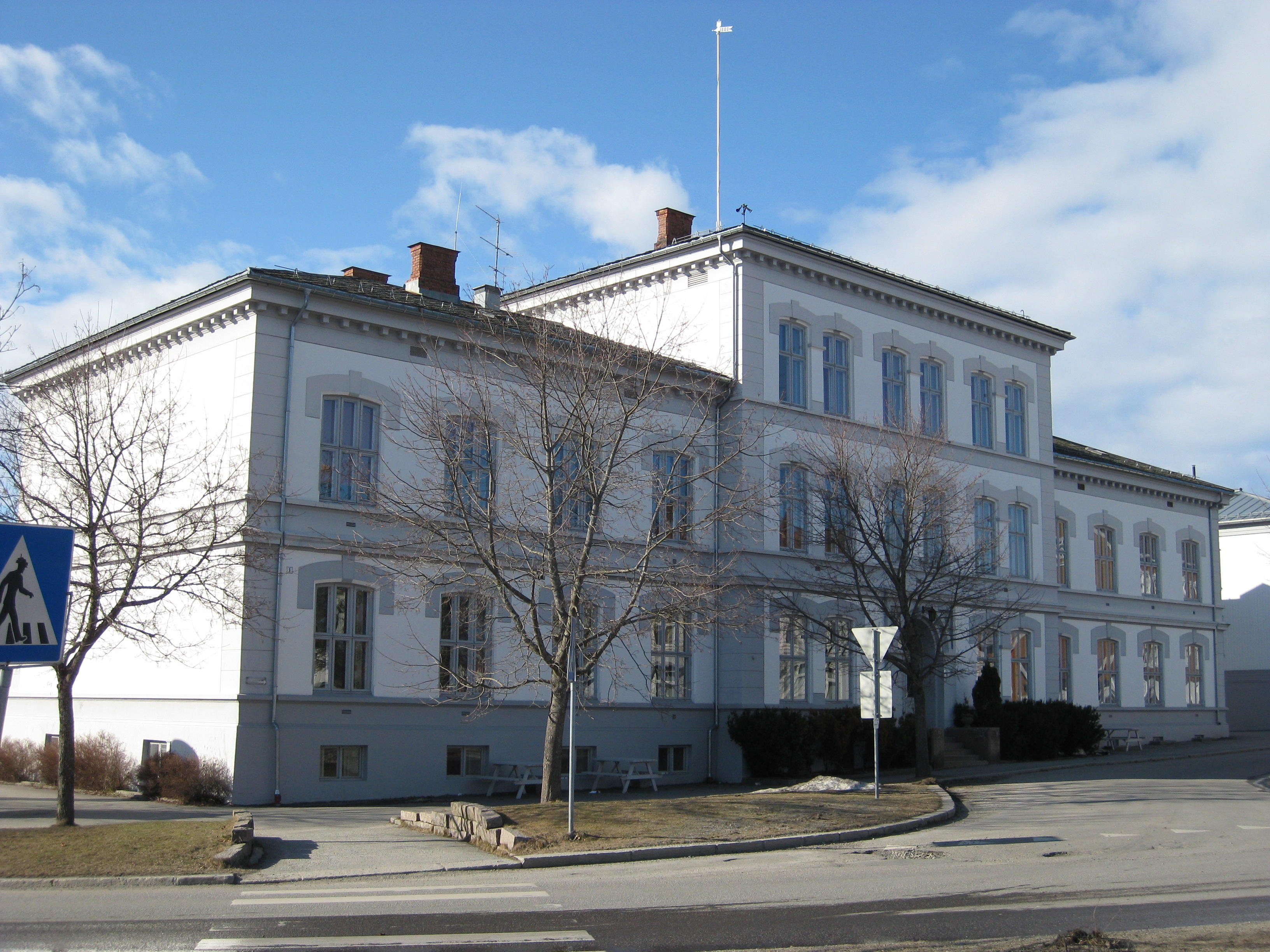 Øvrebyen videregående skole i Kongsvinger.